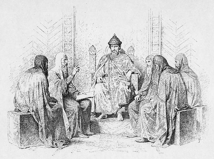 Великий Князь Василий Ярославич. 1272-1276 г.Великий Князь Василий Ярославич во всем следовал правлению брата своего Ярослава. В 1274 г. им созван собор епископов для восстановления церковных уставов.